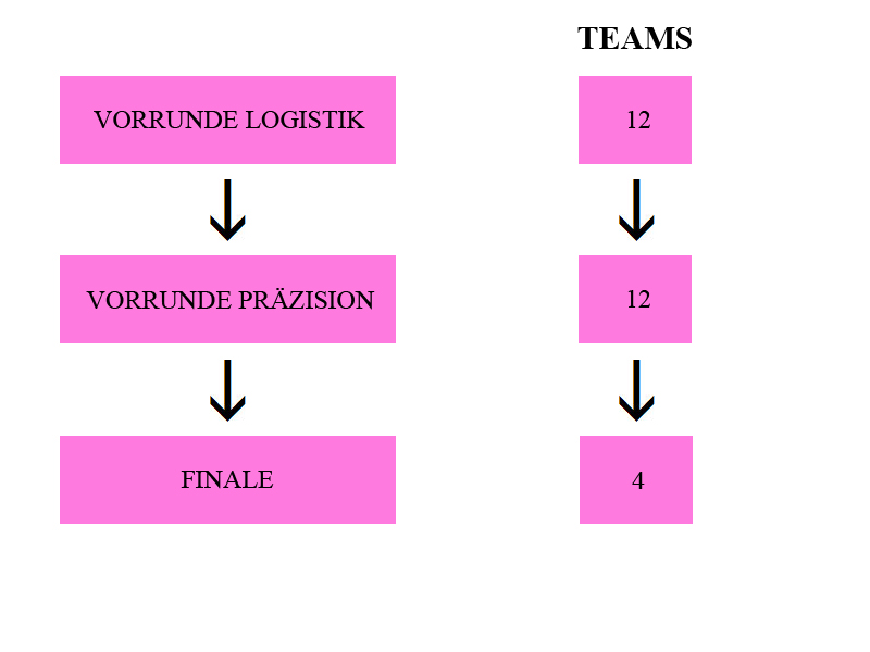 Turnierverlauf Firmenteam-Meisterschaft